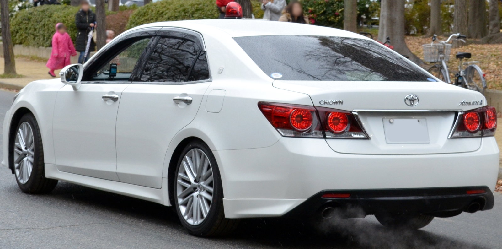 210系クラウンの交通覆面パトカー